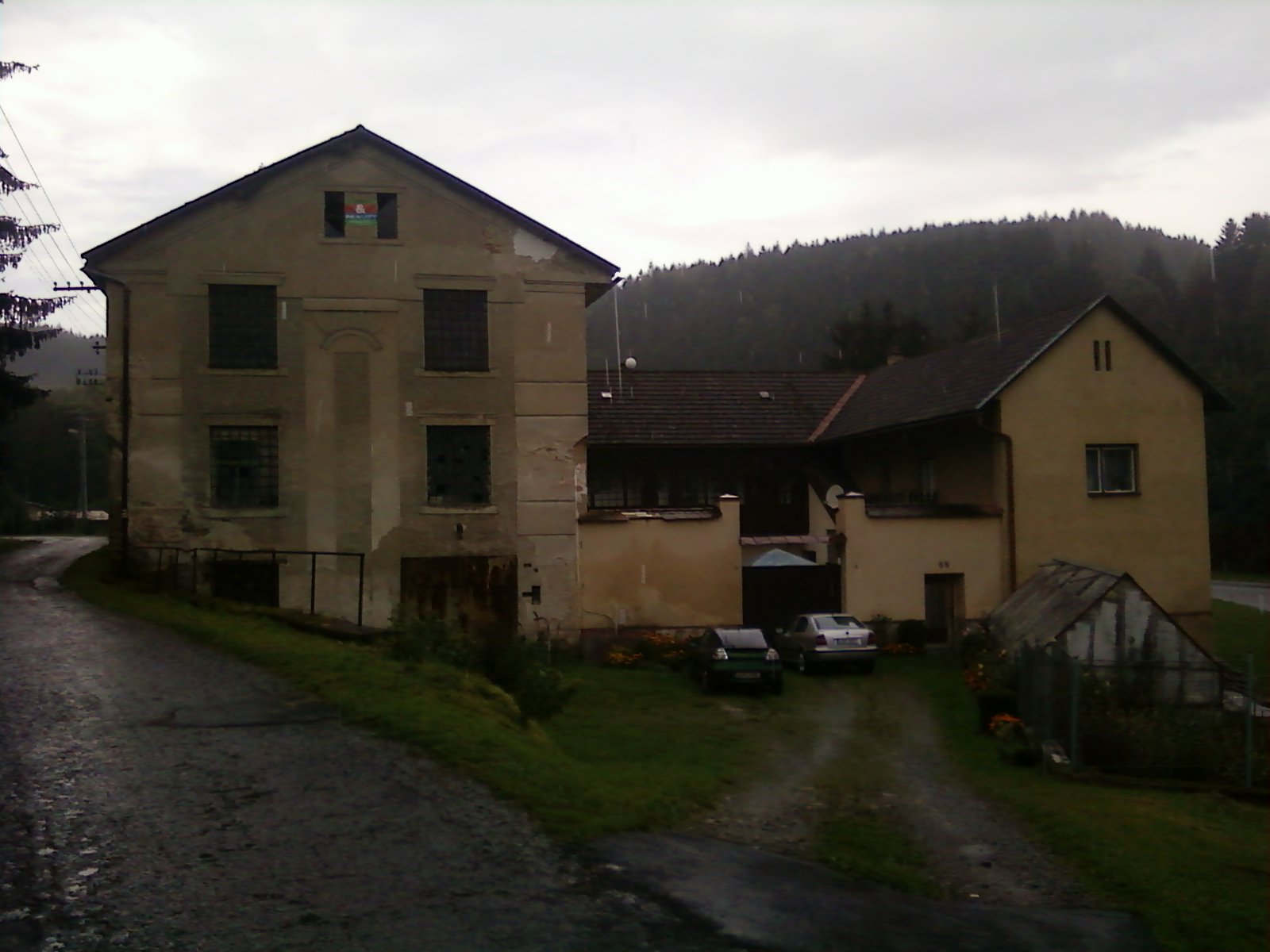 bývalý Horní mlýn v Jimramově, Panská čp. 58.